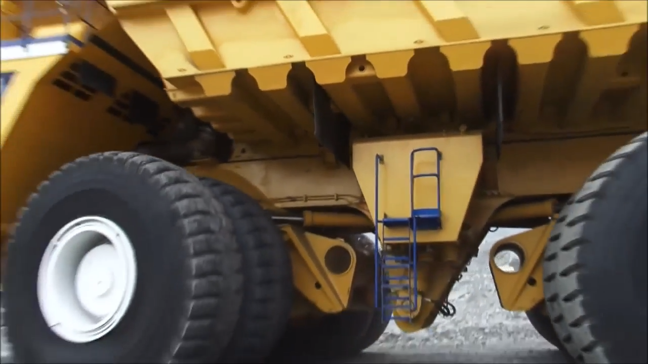 БелАЗ 75710 в Черниговском разрезе, Кемеровская область